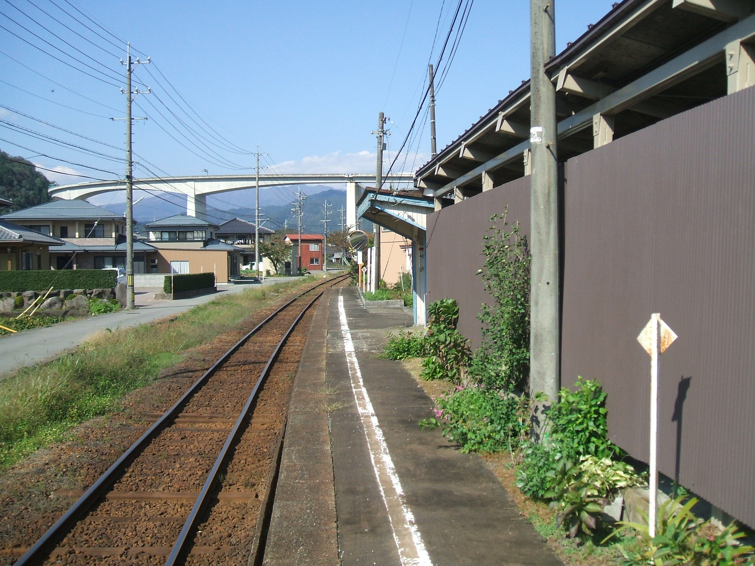 大島駅ホームの様子